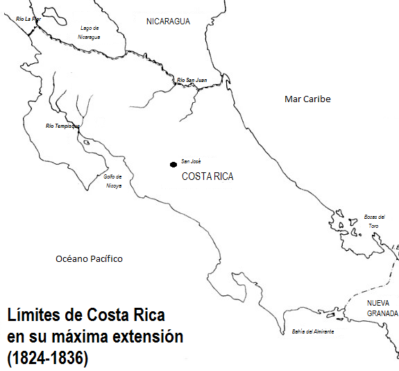 Límites territoriales máximos de Costa Rica en su máxima extensión (1824-1836), desde la Anexión del Partido de Nicoya hasta la Usurpación colombiana.